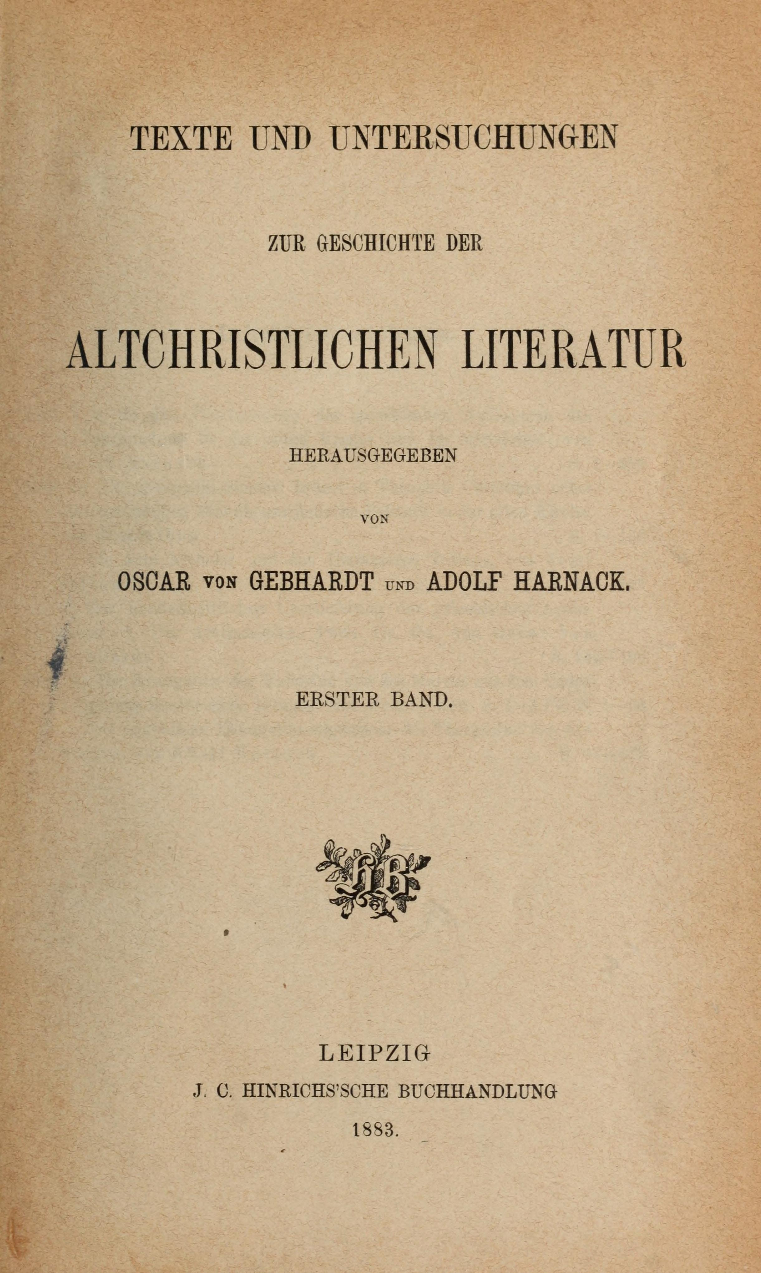 Texte und Untersuchungen zur Geschichte der altchtristlichen Literatur. Titelblatt des 1. Bands.